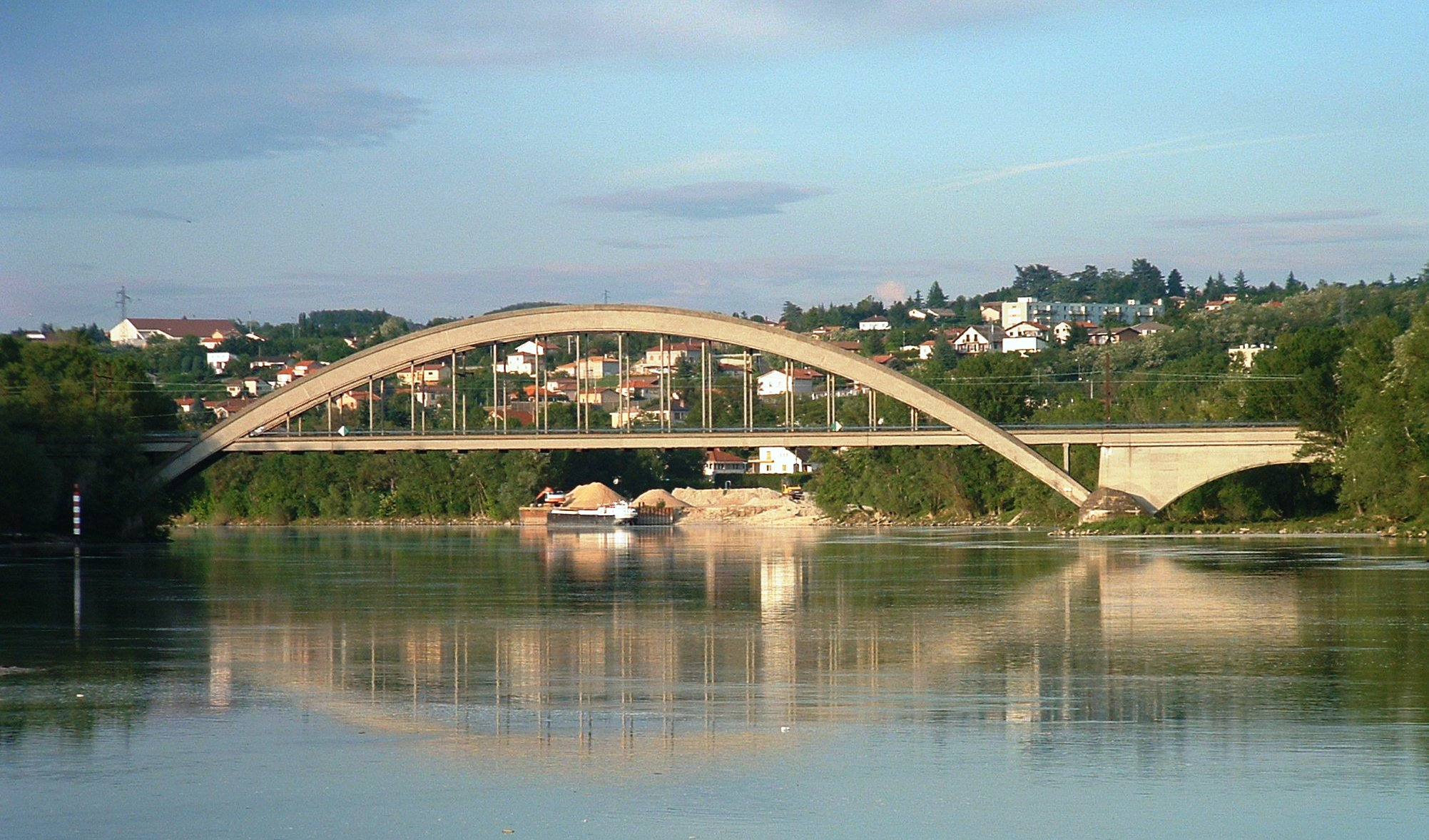 Viaduc ferroviaire de la Méditerranée entre Grigny et Ternay